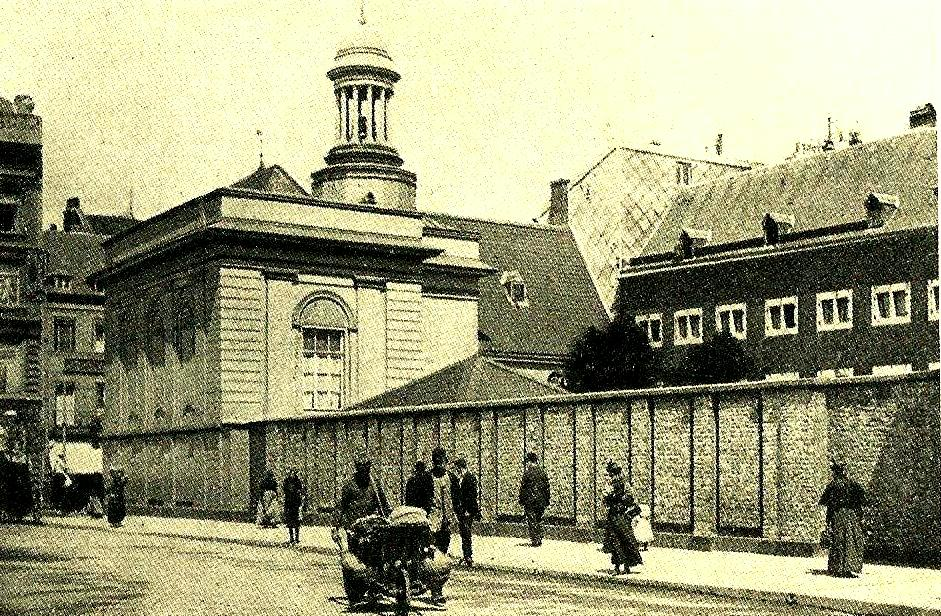 ehemaliges Kloster der Christenserinnen bis 1899 an der Ecke Theaterplatz/Kapuzinergraben in Aachen; Architekt Klosterkapelle: Adam Franz Friedrich Leydel